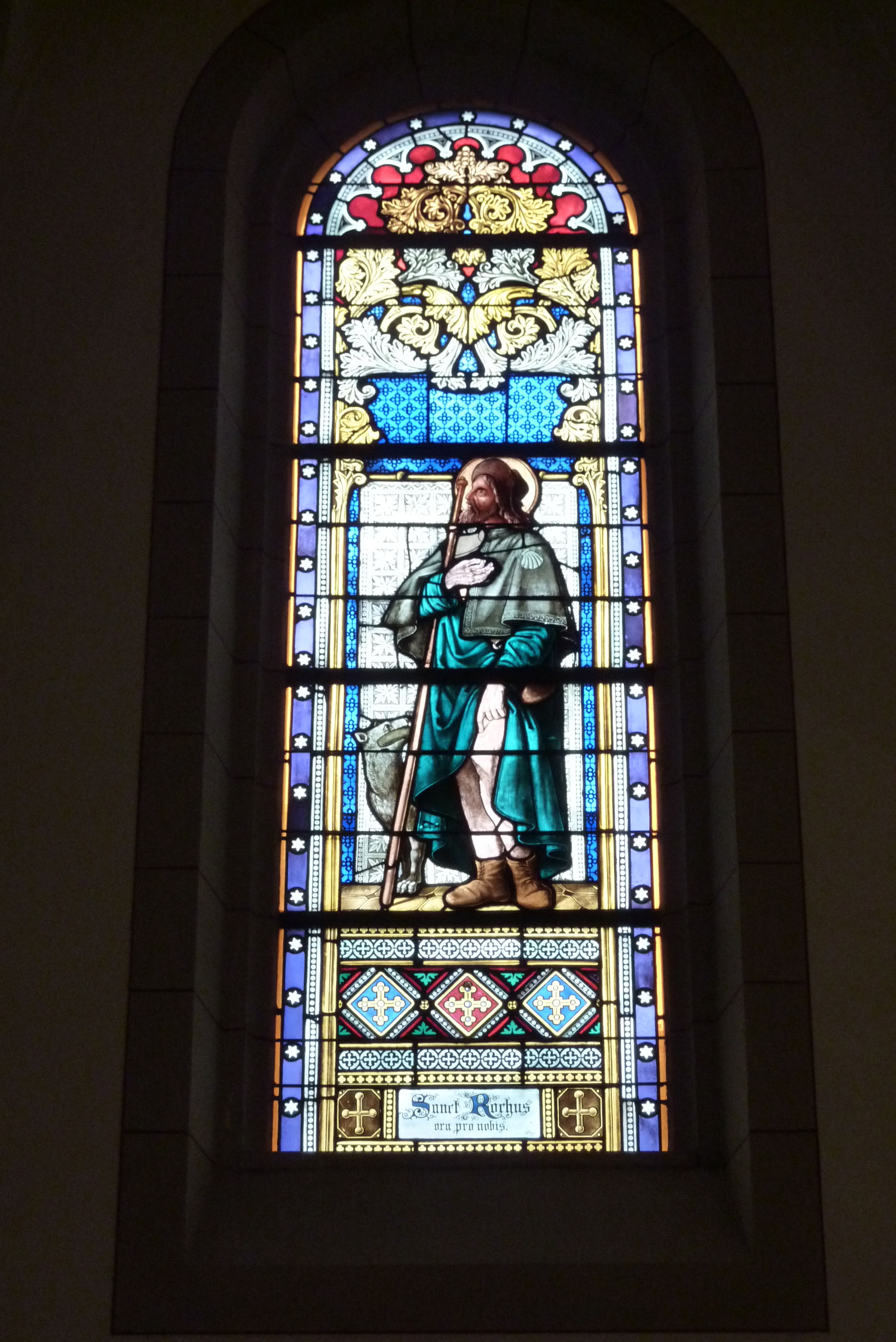 katholische Pfarrkirche St. Rochus in Hatzenport, Bleiglasfenster mit der Darstellung des hl. Rochus